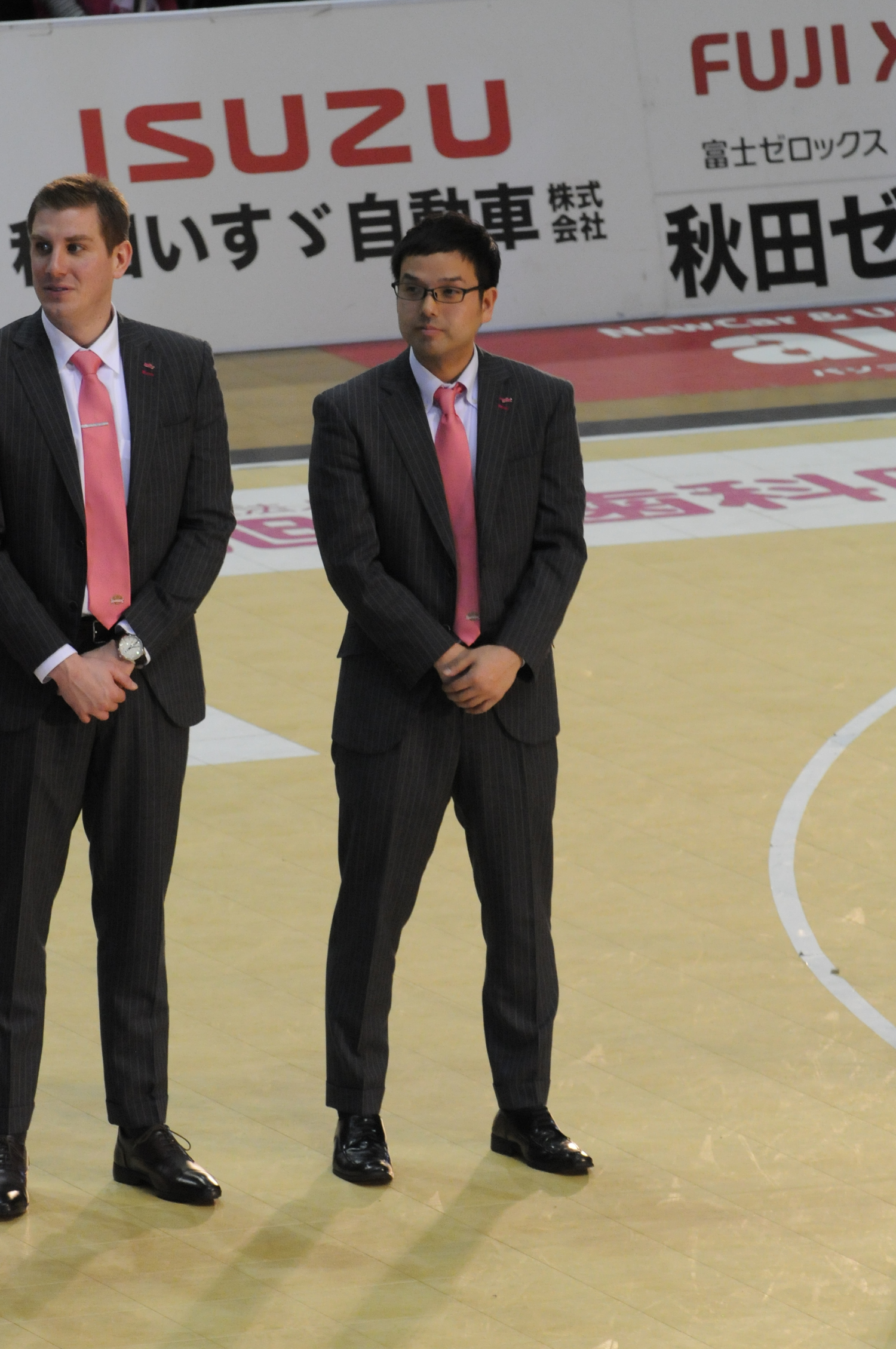 広島ドラゴンフライズ、ハミン・クウェインタンス選手。代々木第一体育館で。